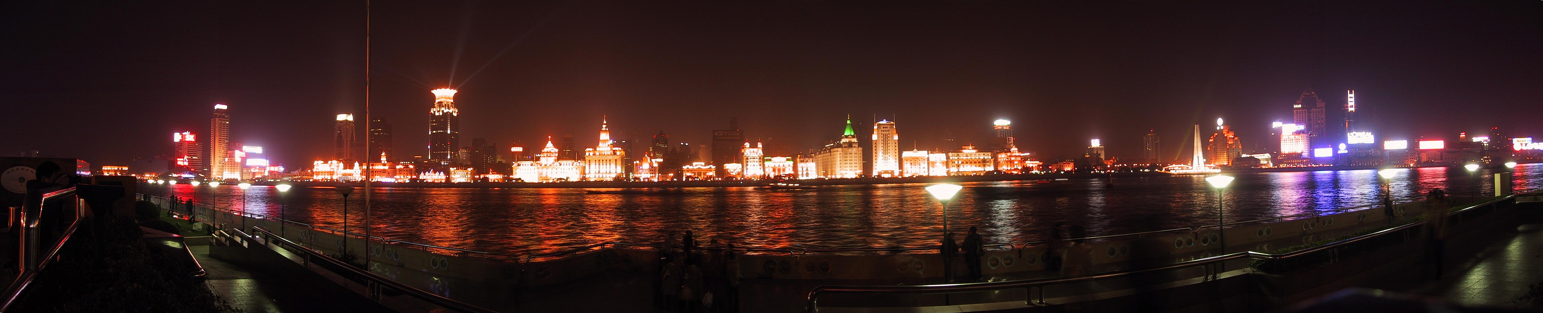 Nachtpanorama vom "Bund" in Shanghai